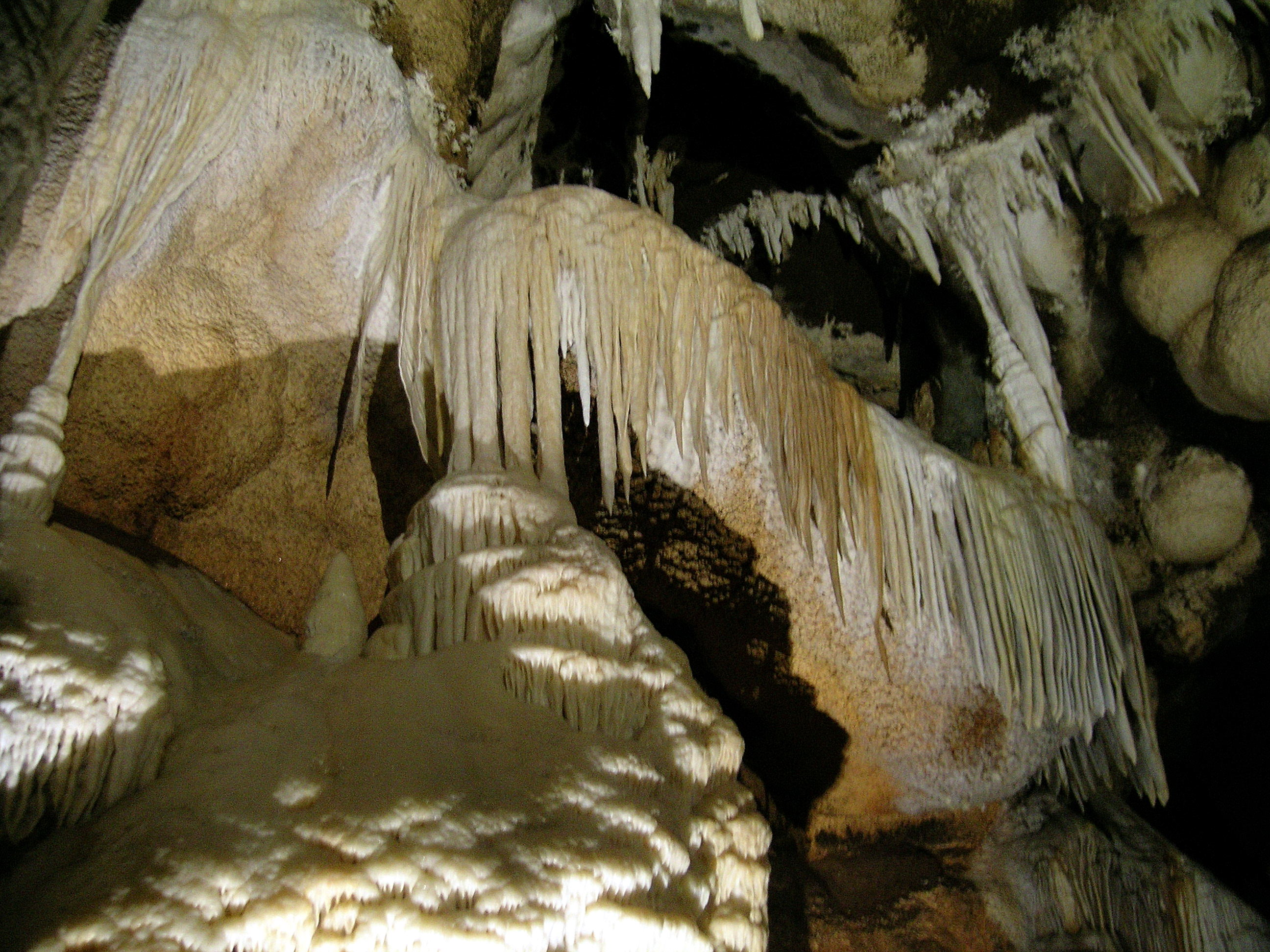 Grotta Santa Barbara, Iglesias